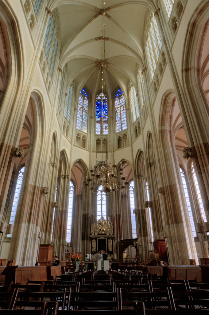 Het middenschip van de domkerk